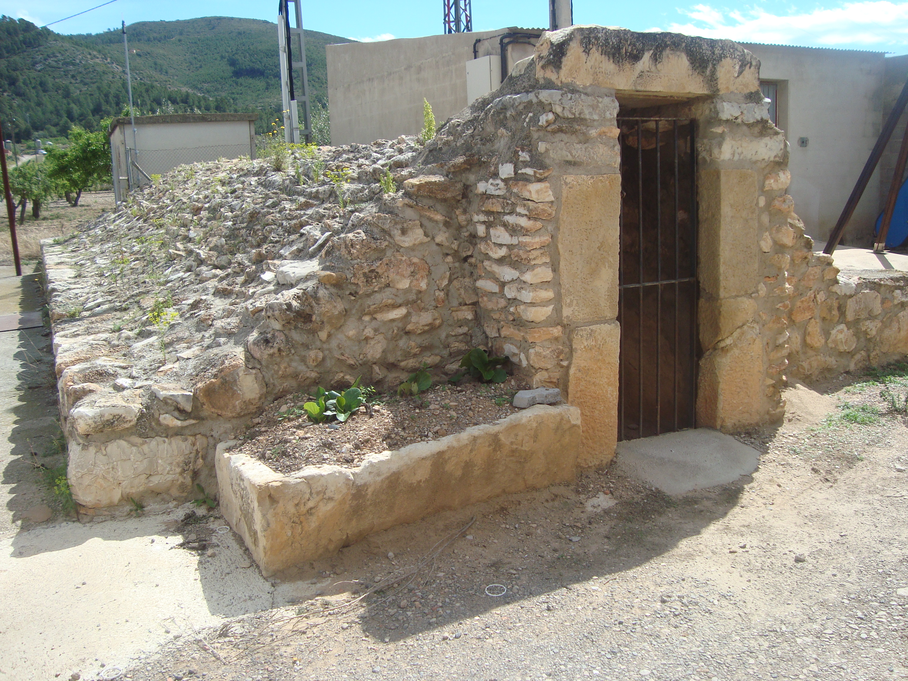 Aljub, any1880 (Els Ibarsos, La Serra d'en Garcerán)